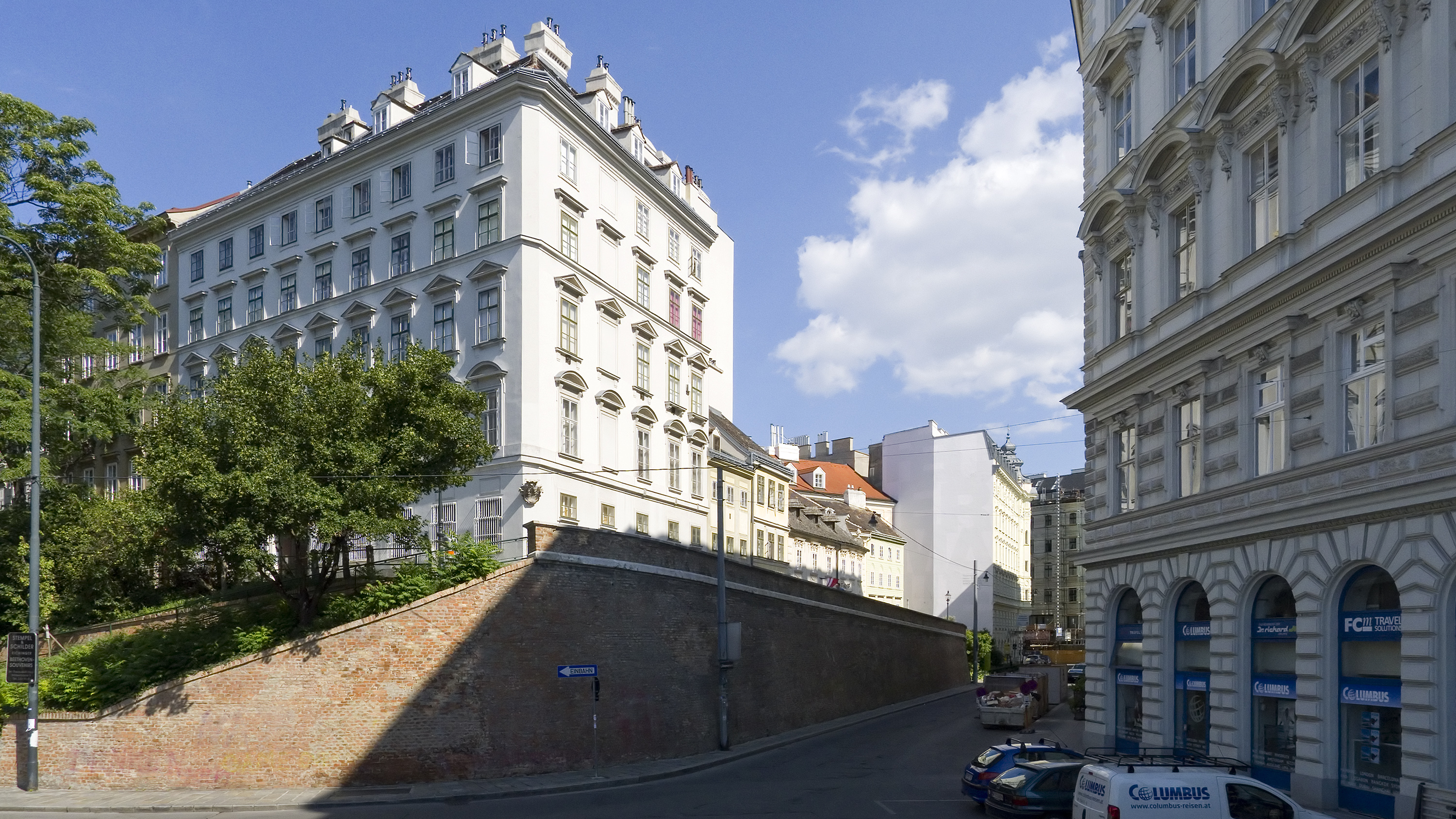 Schreyvogelgasse in Wien 1 bei der Mölker Bastei Richtung Südosten